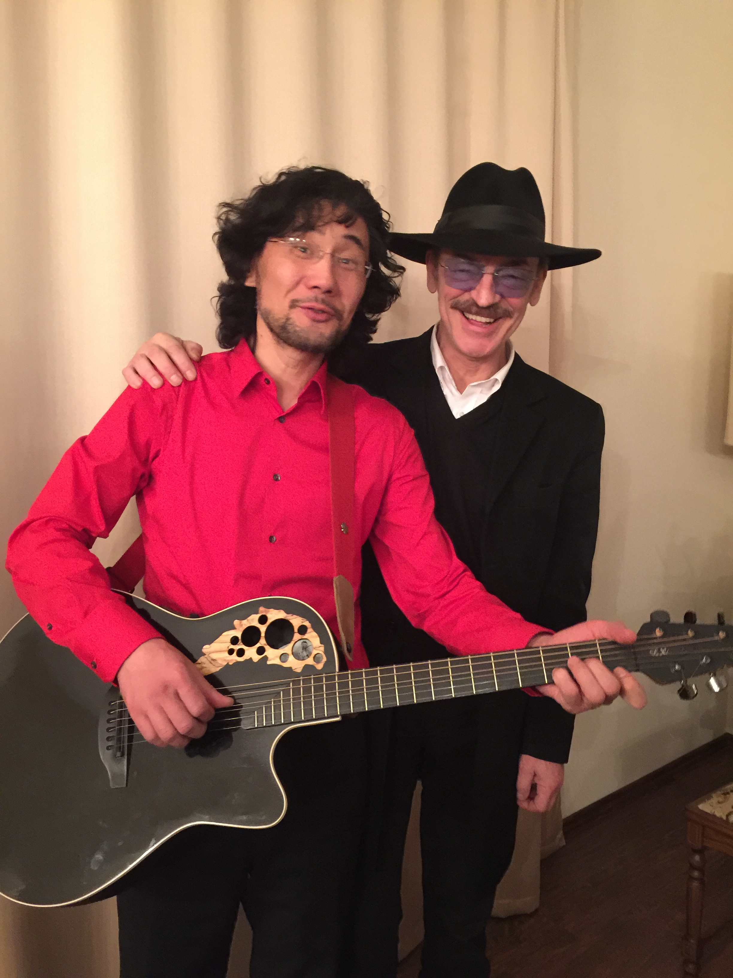 Михаил Боярский и Нариман Султанбеков после совместного выступления